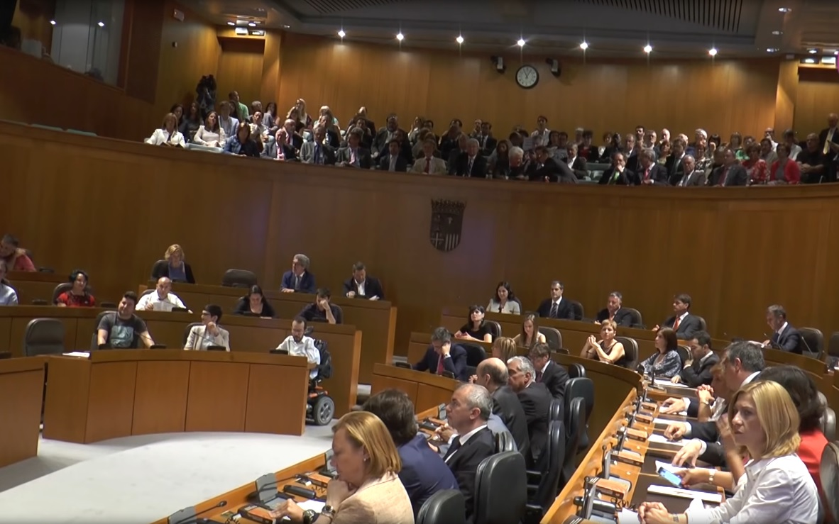 Hemiciclo de las Cortes de Aragón.